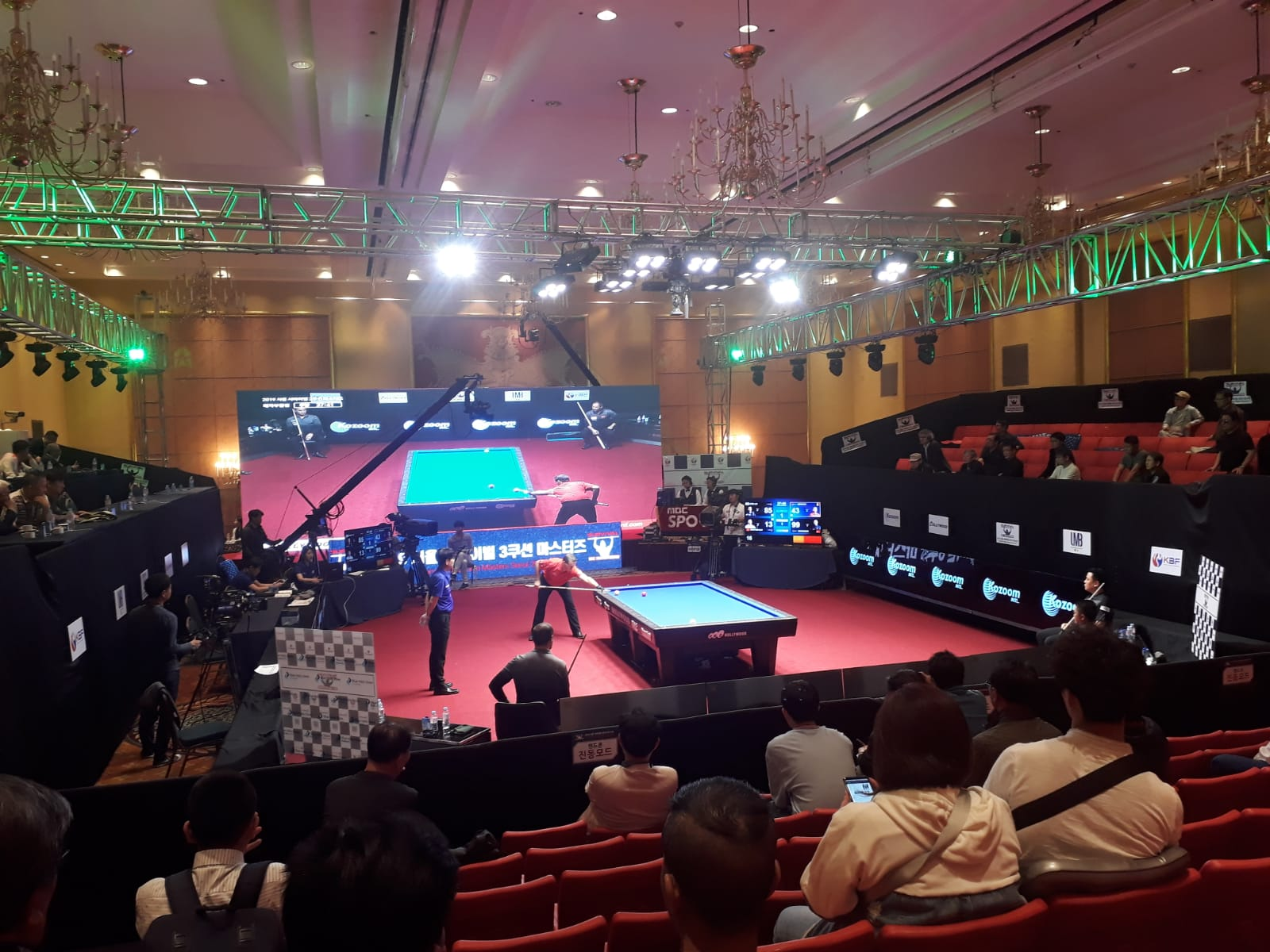 siehe Dateiname Grand Hilton, Seoul